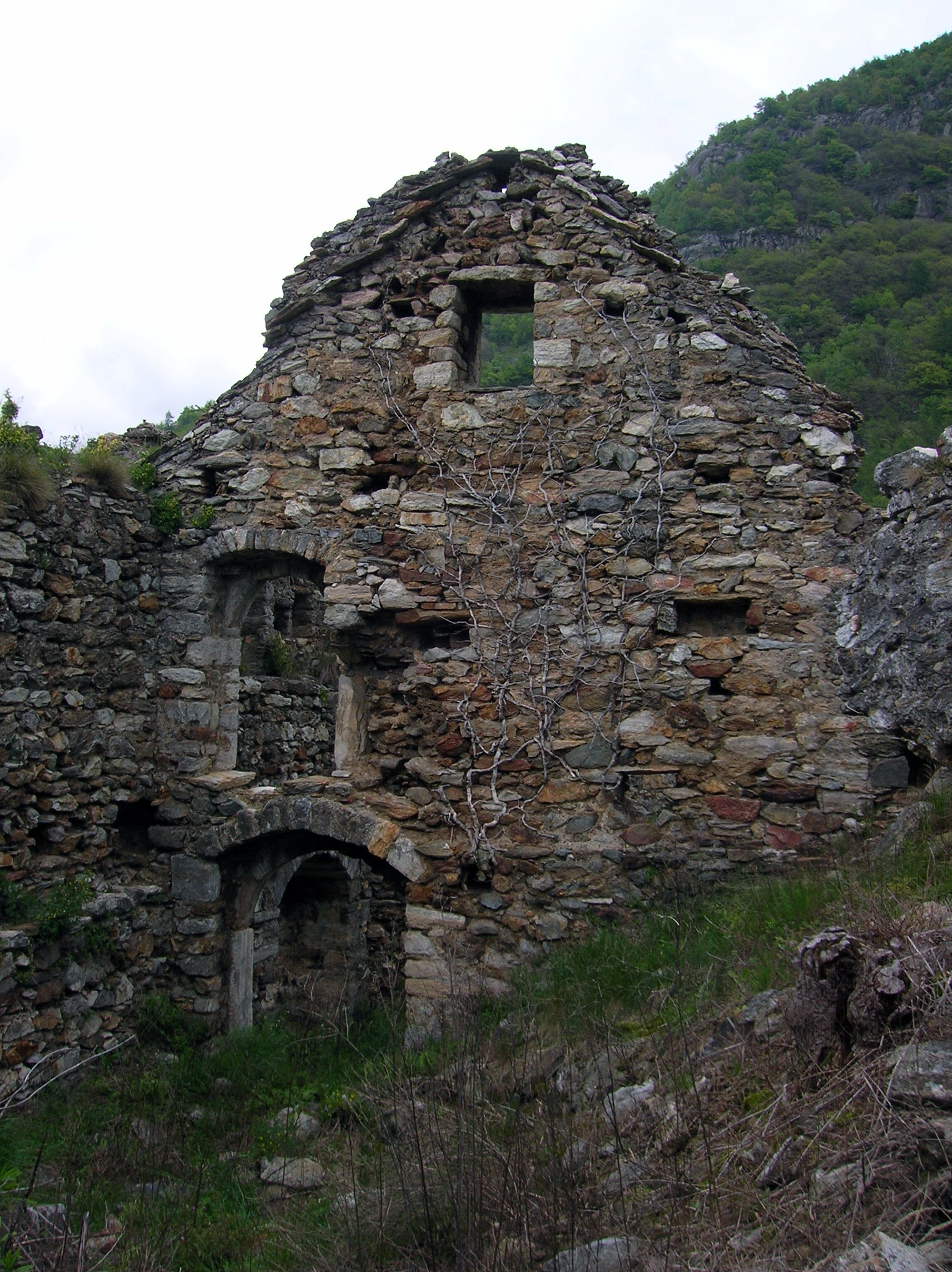 Castello di Suzey, loc. Ivéry, Pont-Saint-Martin, Valle d'Aosta, Italia.